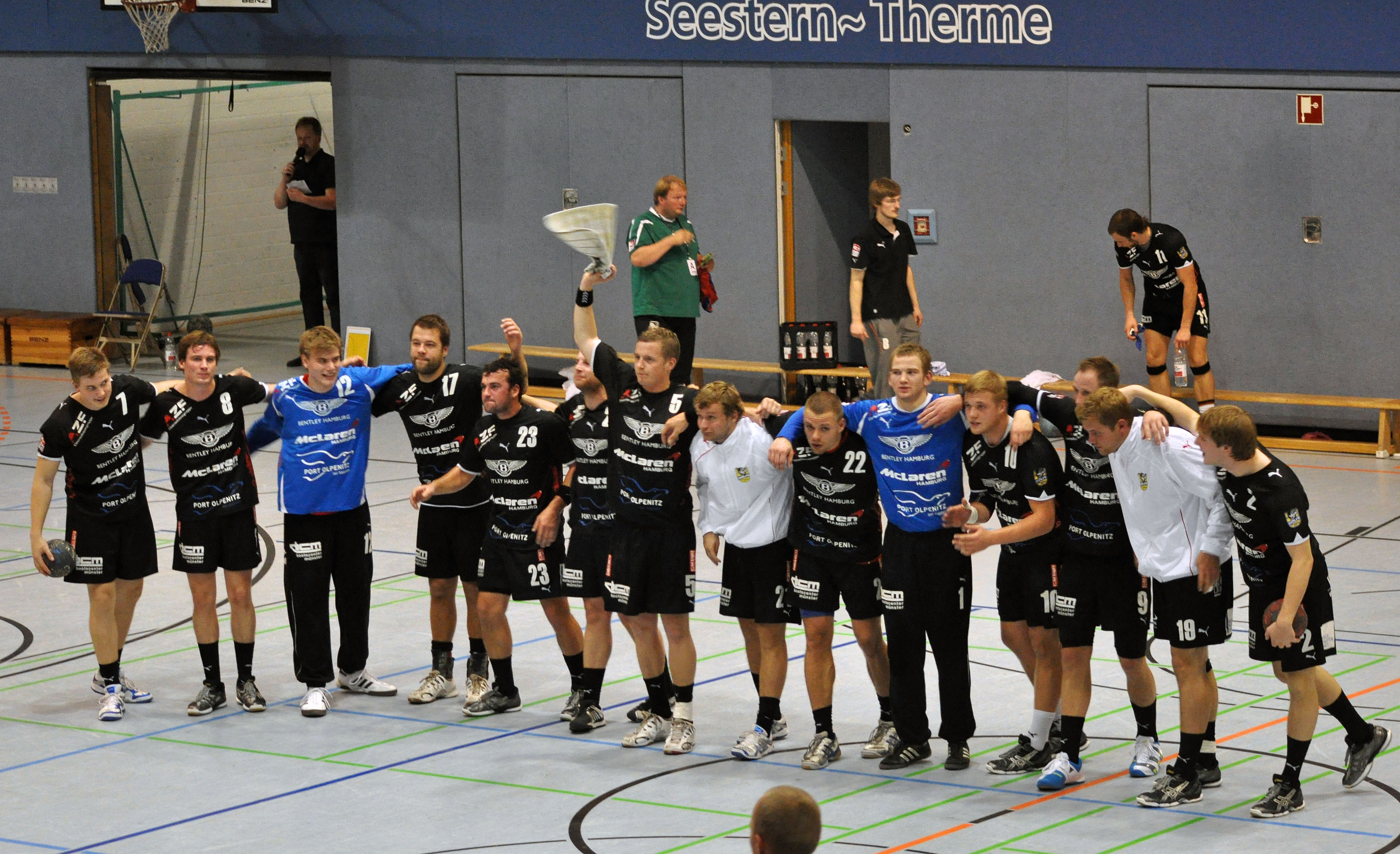 Die Fotos entstanden am 2. Spieltag der 3. Liga, Staffel Nord. Die Begegnung zwischen dem Stralsunder HV und den Wölfen Tarp-Wanderup in der Vogelsanghalle Stralsund endete 27:30.